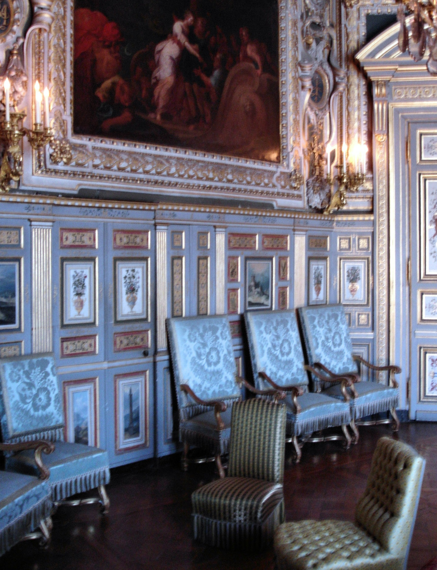 Salon Ludwigs XIII. im Schloss Fontainebleau